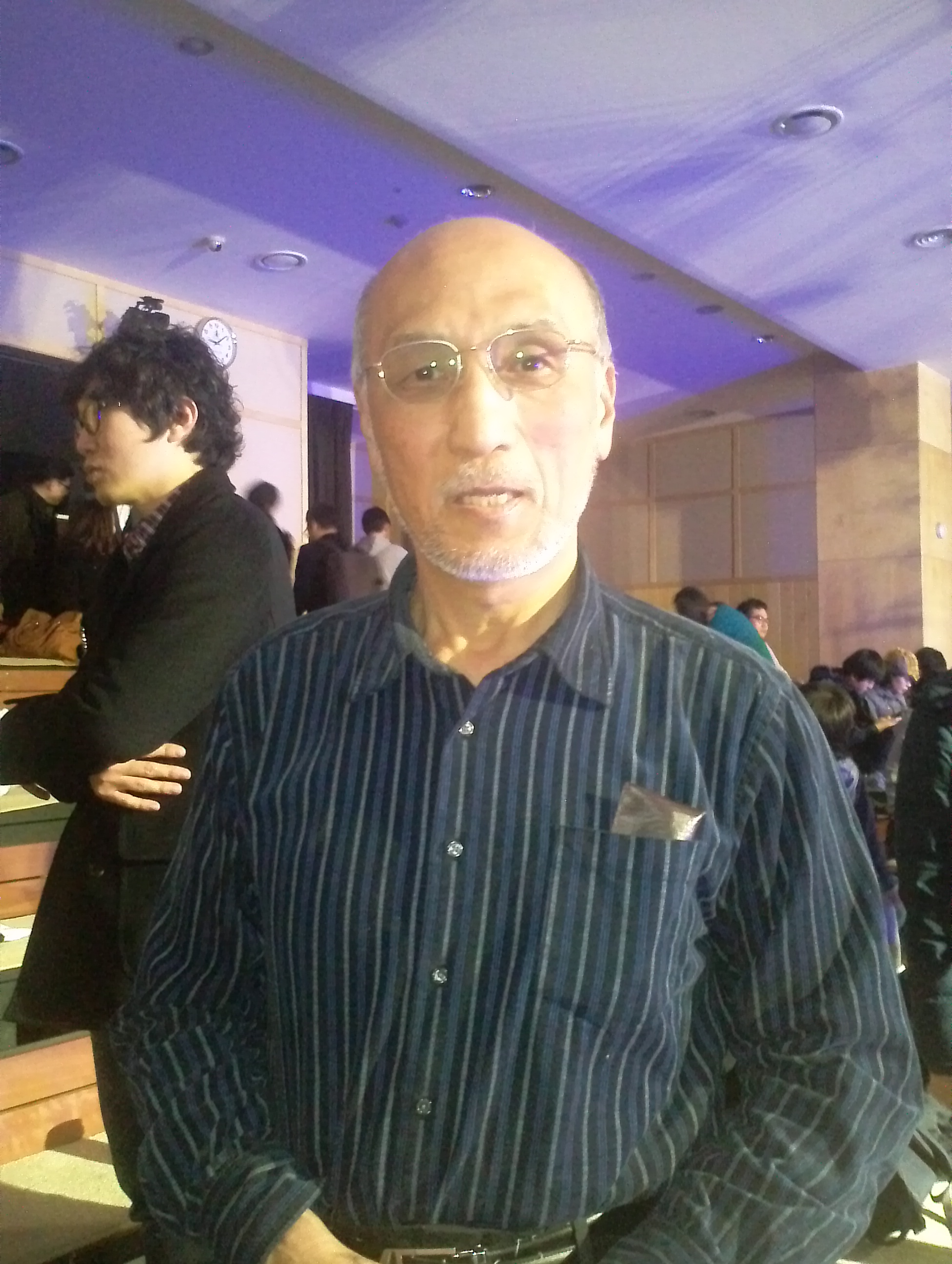 현 게이오대학 쇼난후지사와캠퍼스 정책 미디어 연구과 특임교수. 전길남